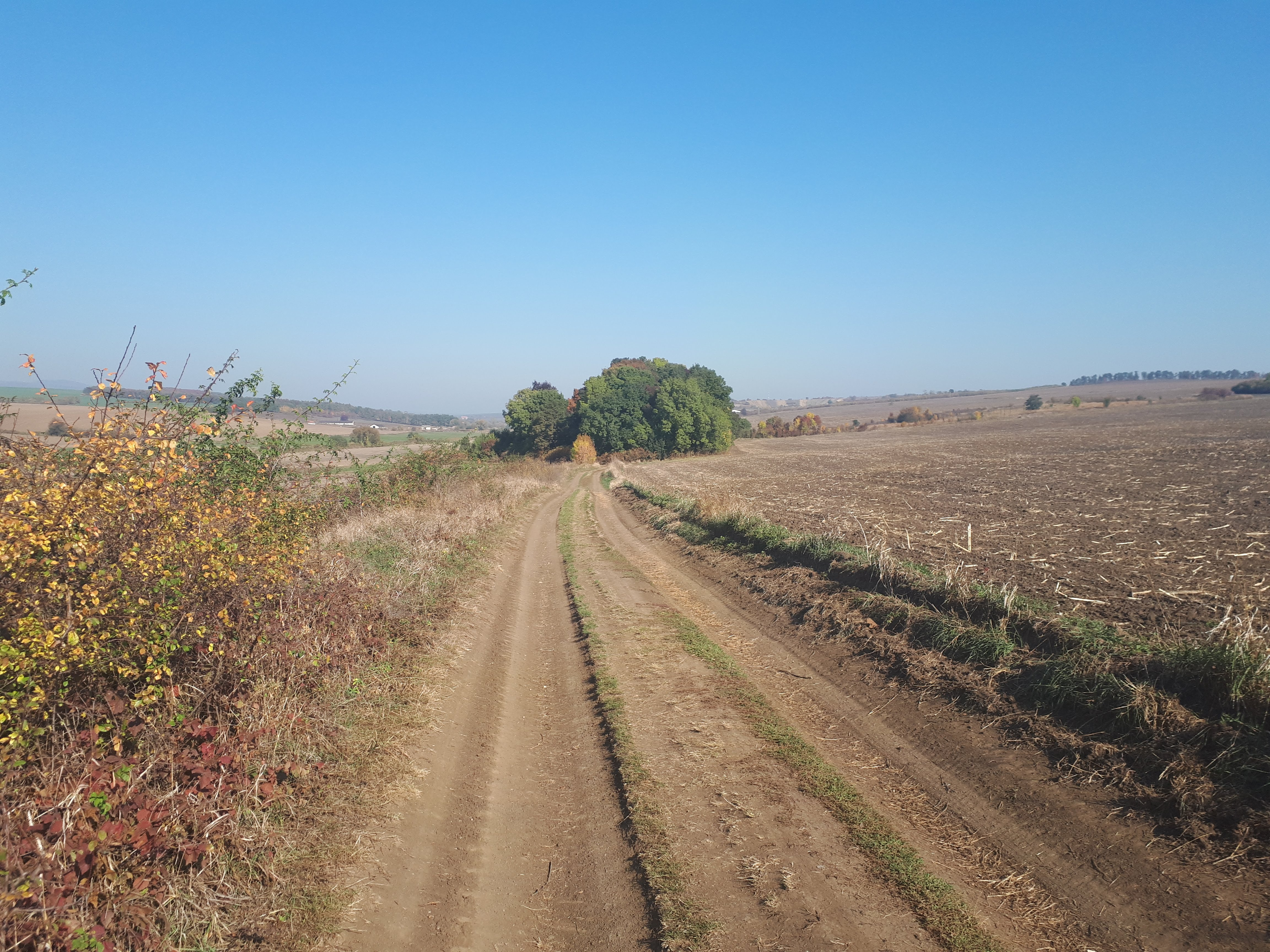 A Harsány és Vatta közötti mezőgazdasági út 2018 októberében